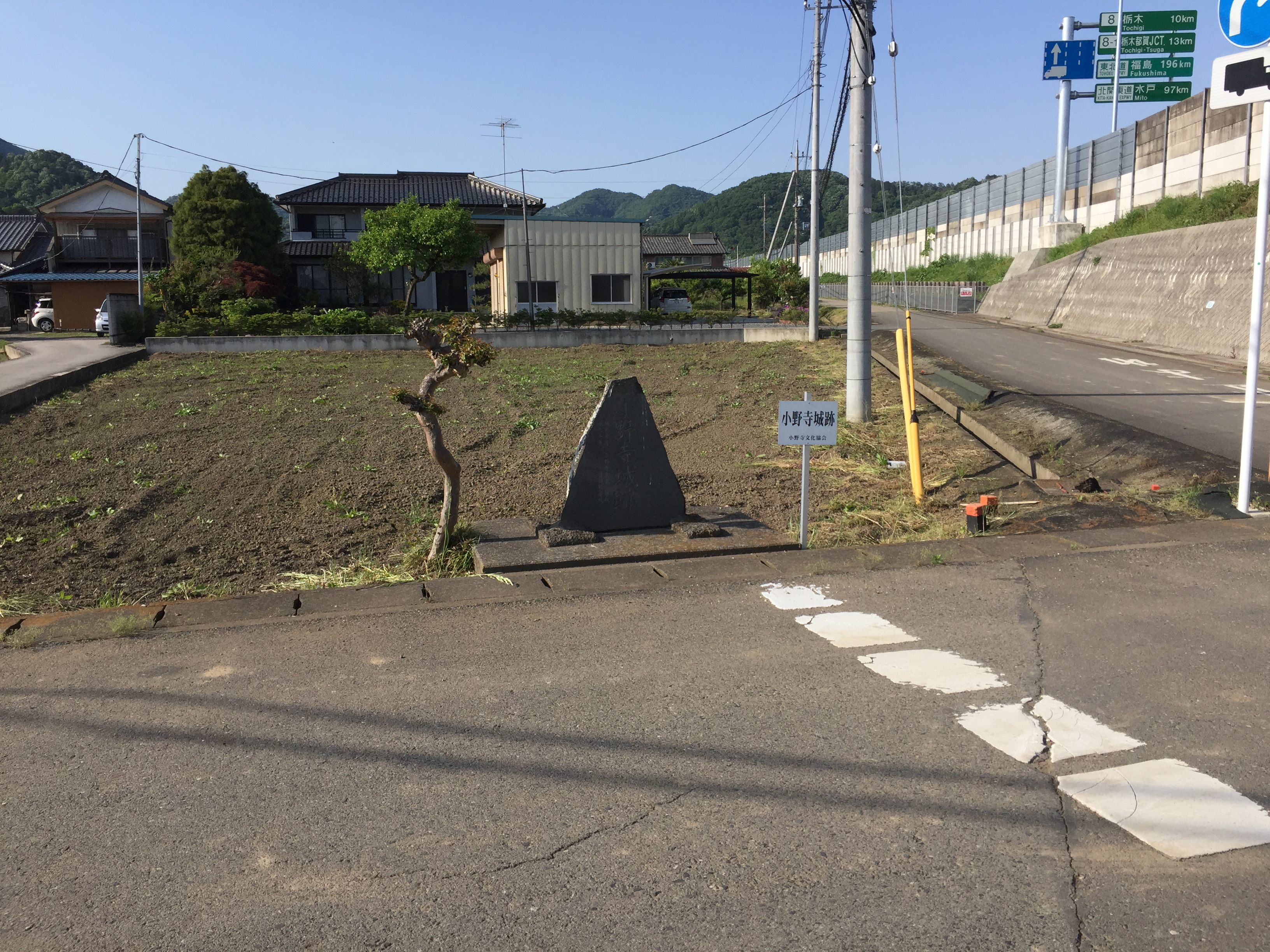 栃木県栃木市岩舟町小野寺にある、小野寺城跡の石碑。